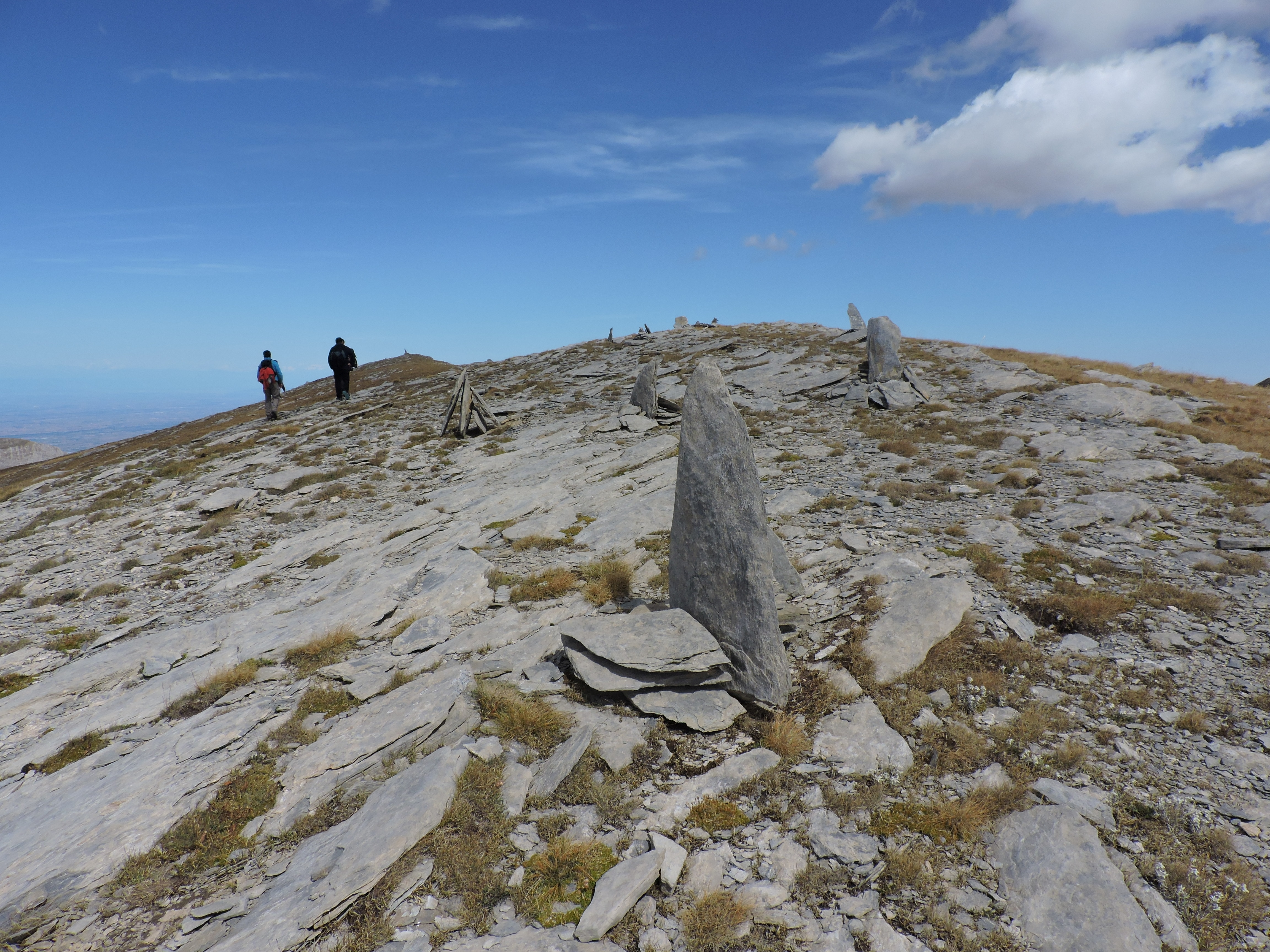 Pian Ballaur (Alpi Liguri): gli ometti presso la cima